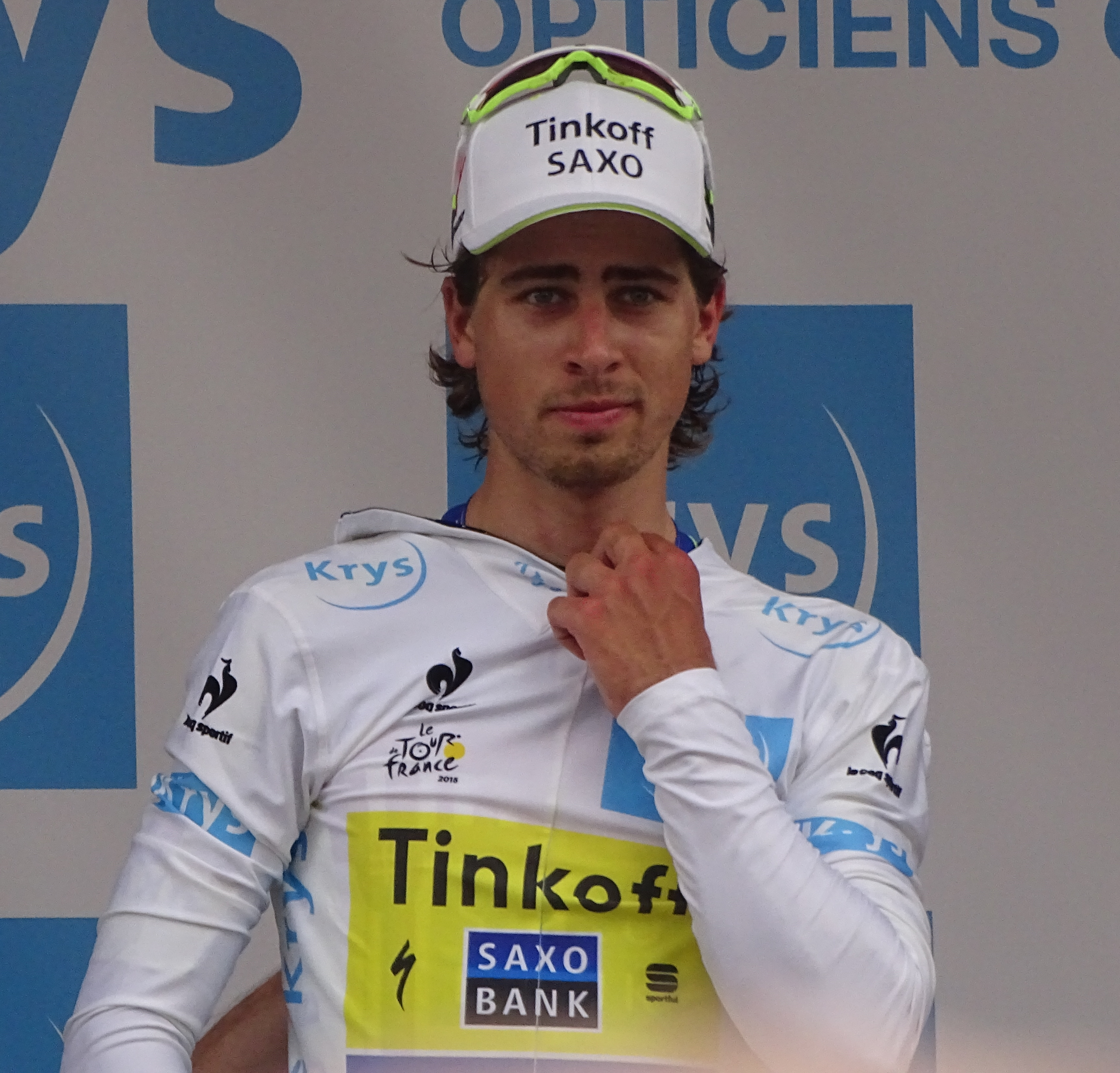 Reportage réalisé le mardi 7 juillet à l'occasion de l'arrivée de la quatrième étape du Tour de France 2015 à Cambrai, Nord-Pas-de-Calais, France.